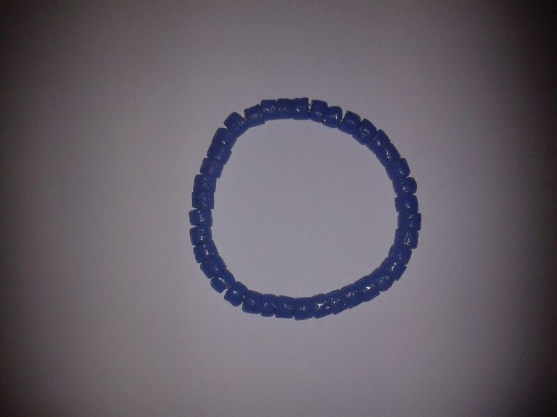 Són braçalets propis per a una entrada en Viquipèdia